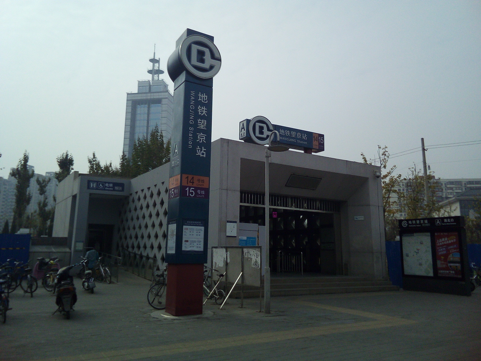 望京 地下鉄 2018